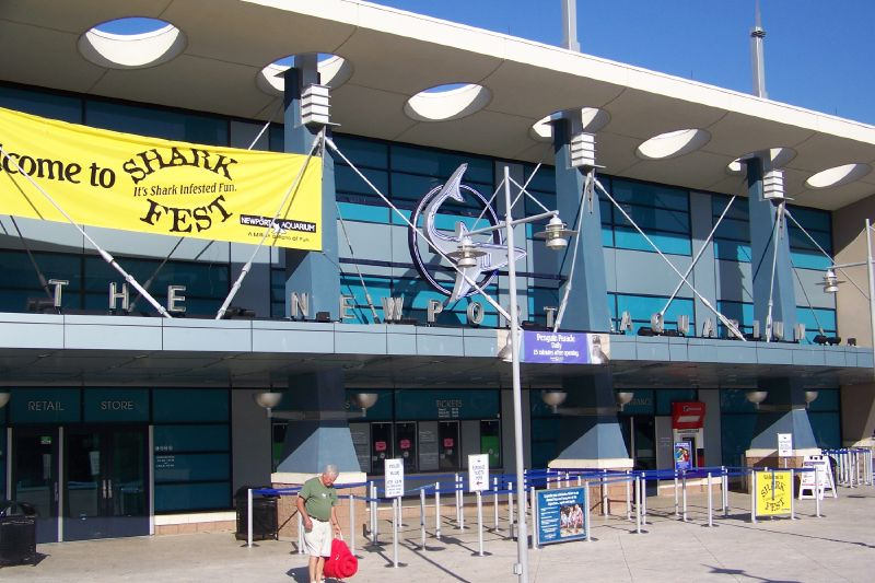 Newport Aquarium